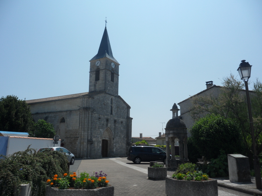 L'église Saint-Etienne d'Arvert